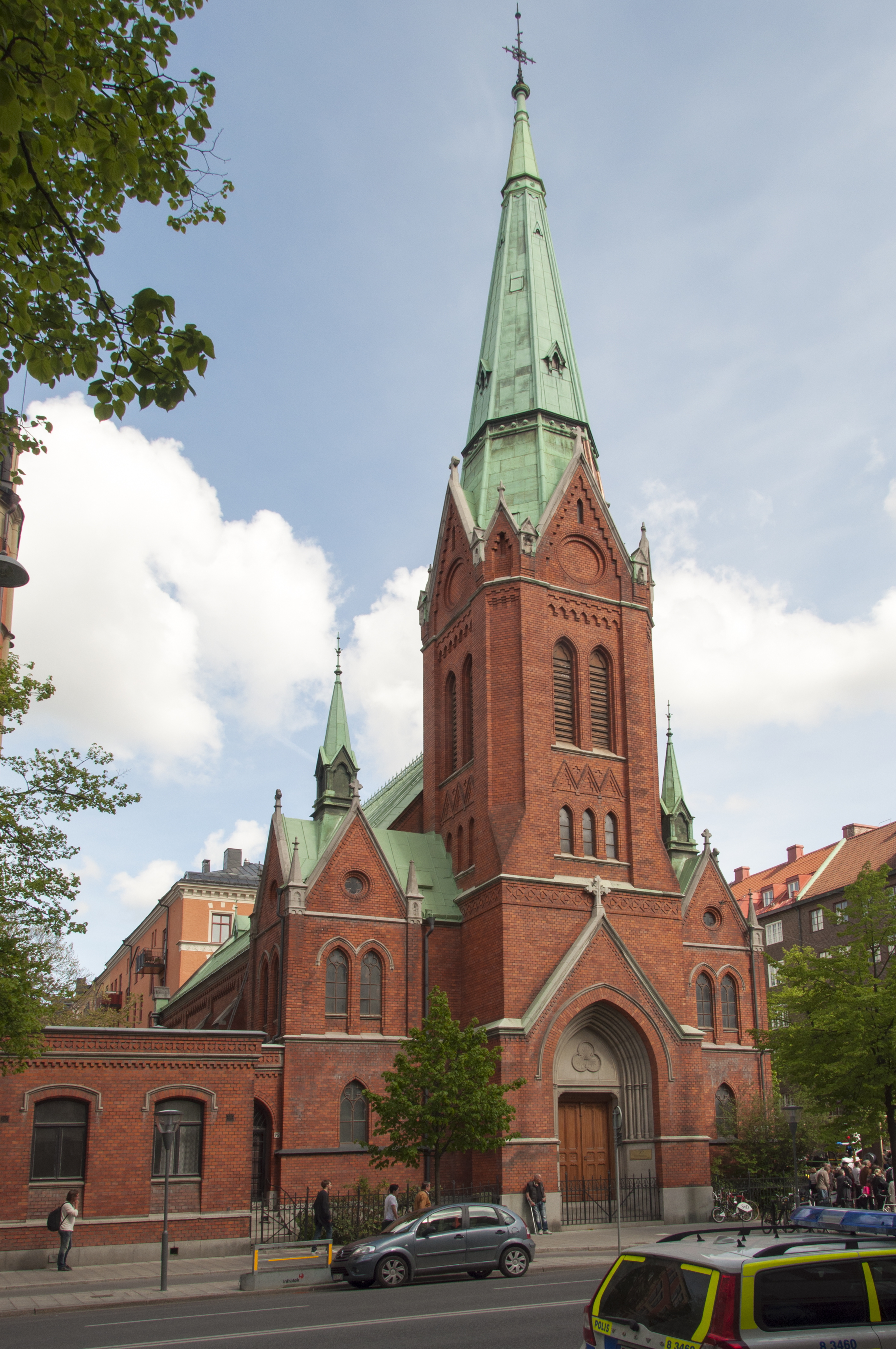 Trasten 2, Birger Jarlsgatan 92, Nybyggnadsår 1889 - 1890, Anders Gustaf Forsberg (Arkitekt) Katolska Apostoliska Församlingen (Byggherre) Per Sundahl (Byggmästare)